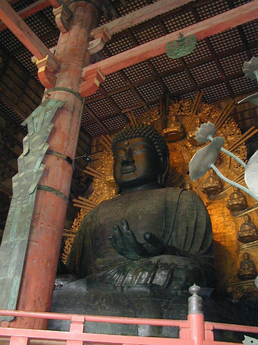 Todai-ji Budda. La foto è stata scattata a Nara (Giappone) nell'agosto 2002 e rappresenta il gigantesco Budda del tempio Todai-ji